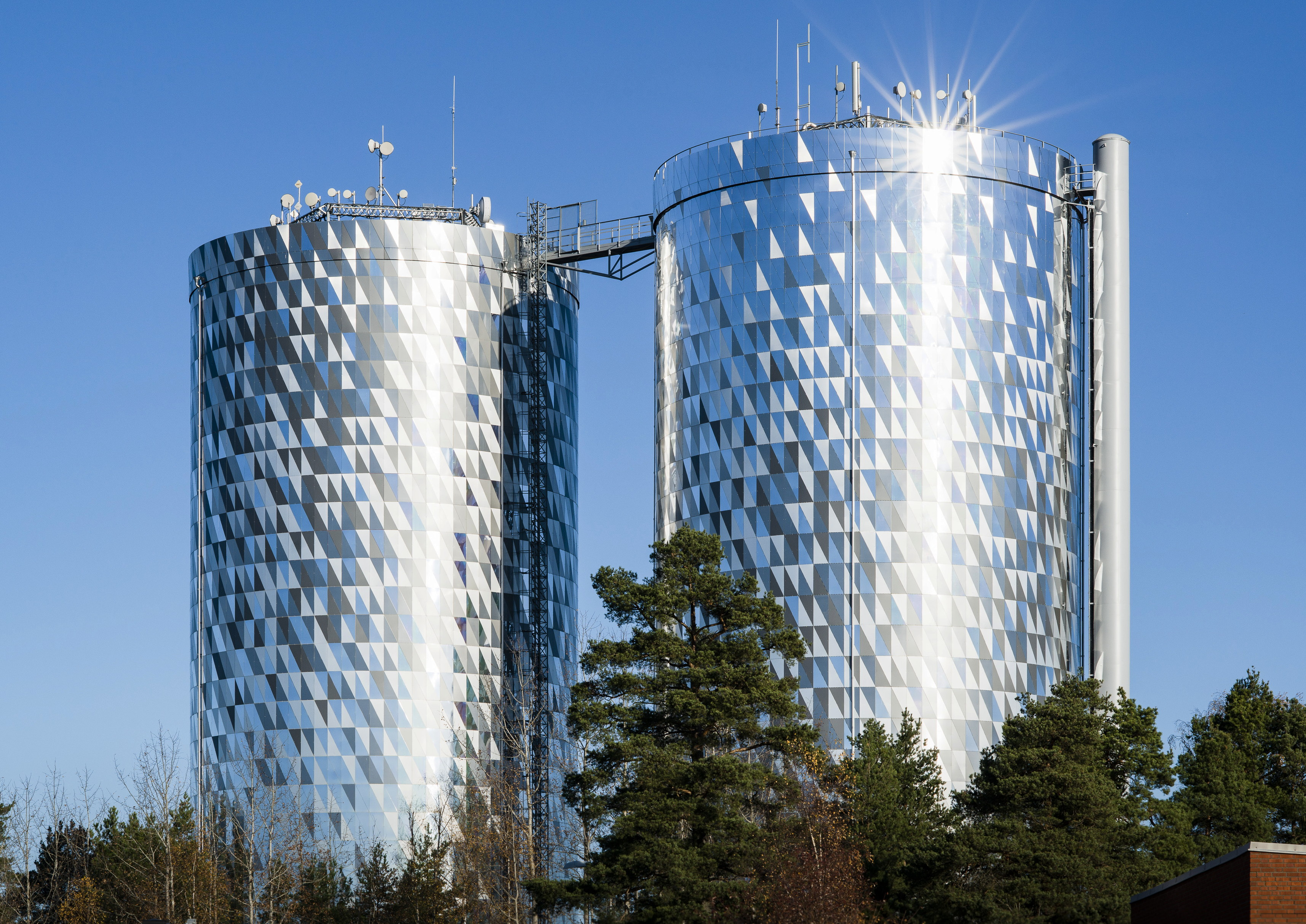 Haninges vattentorn har renoverats till vackra landmärken